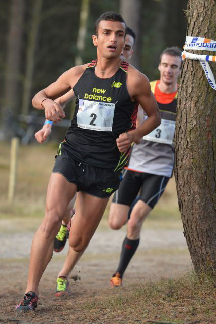 Soufiane Bouchikhi in actie tijdens de Sylvestercross 2014.